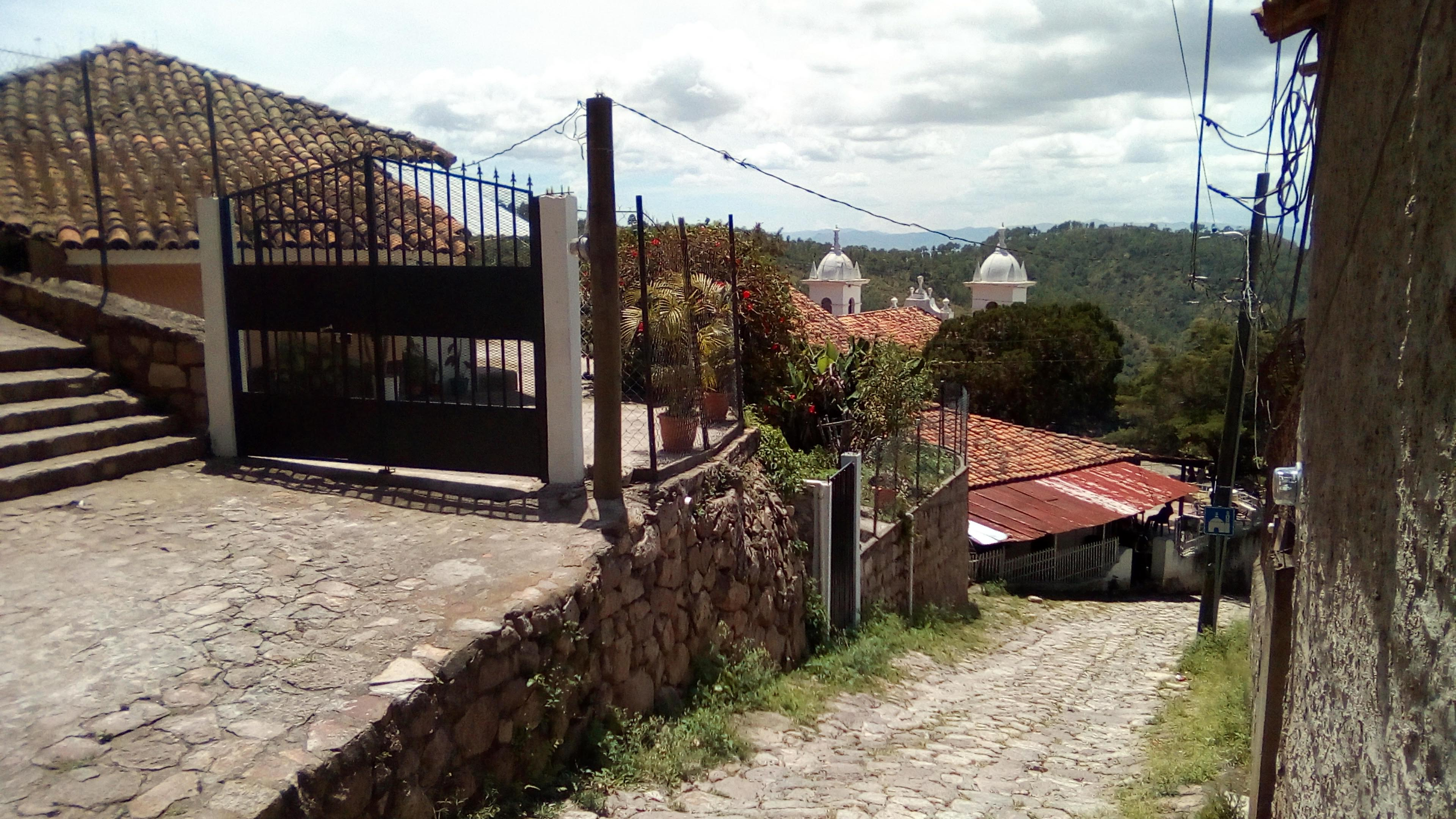 Una calle empedrada